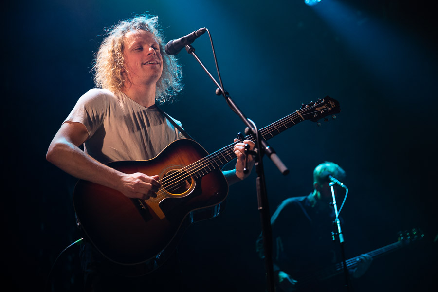 Pål Moddi Knutsen, kjent under artistnavnet Moddi, på scenen på Rockefeller i Oslo 16. november 2019.